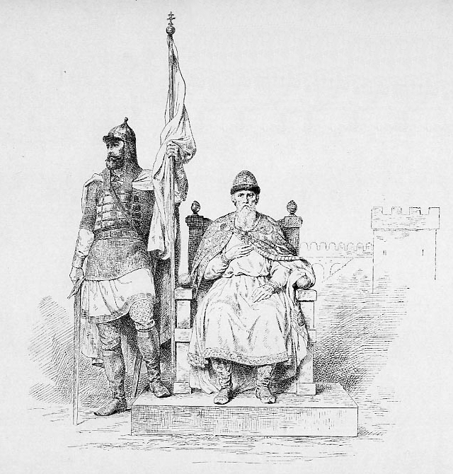 Великий Князь Всеволод Ярославич. 1078-1093 г.Преемник Изяслава, Всеволод Ярославич, всю жизнь старавшийся о восстановлении спокойствия в стране, крепко держался на престоле Киевском победами и доблестью сына своего Владимира Мономаха.